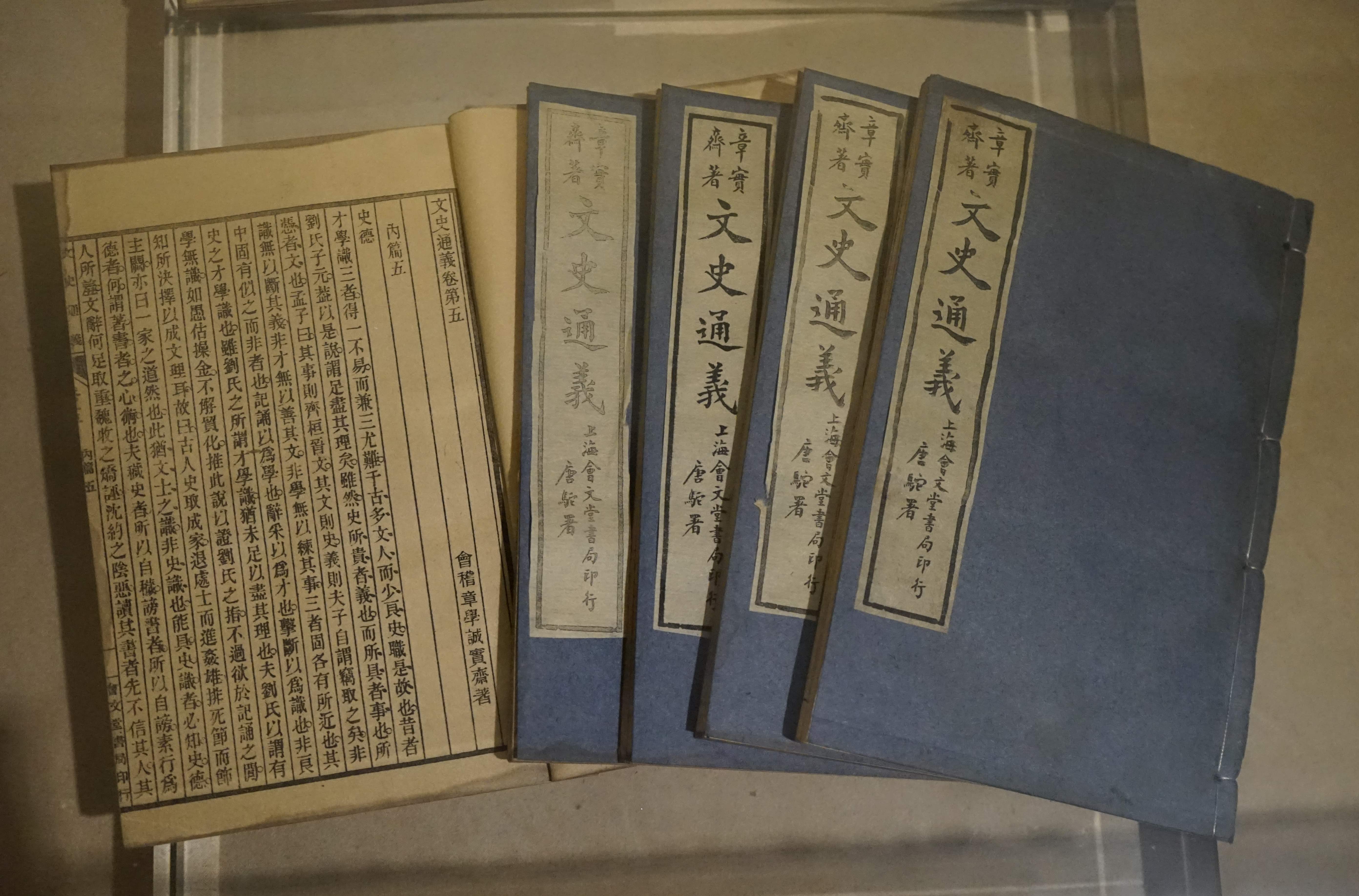 上海会文堂版文史通义，章学诚故居陈列